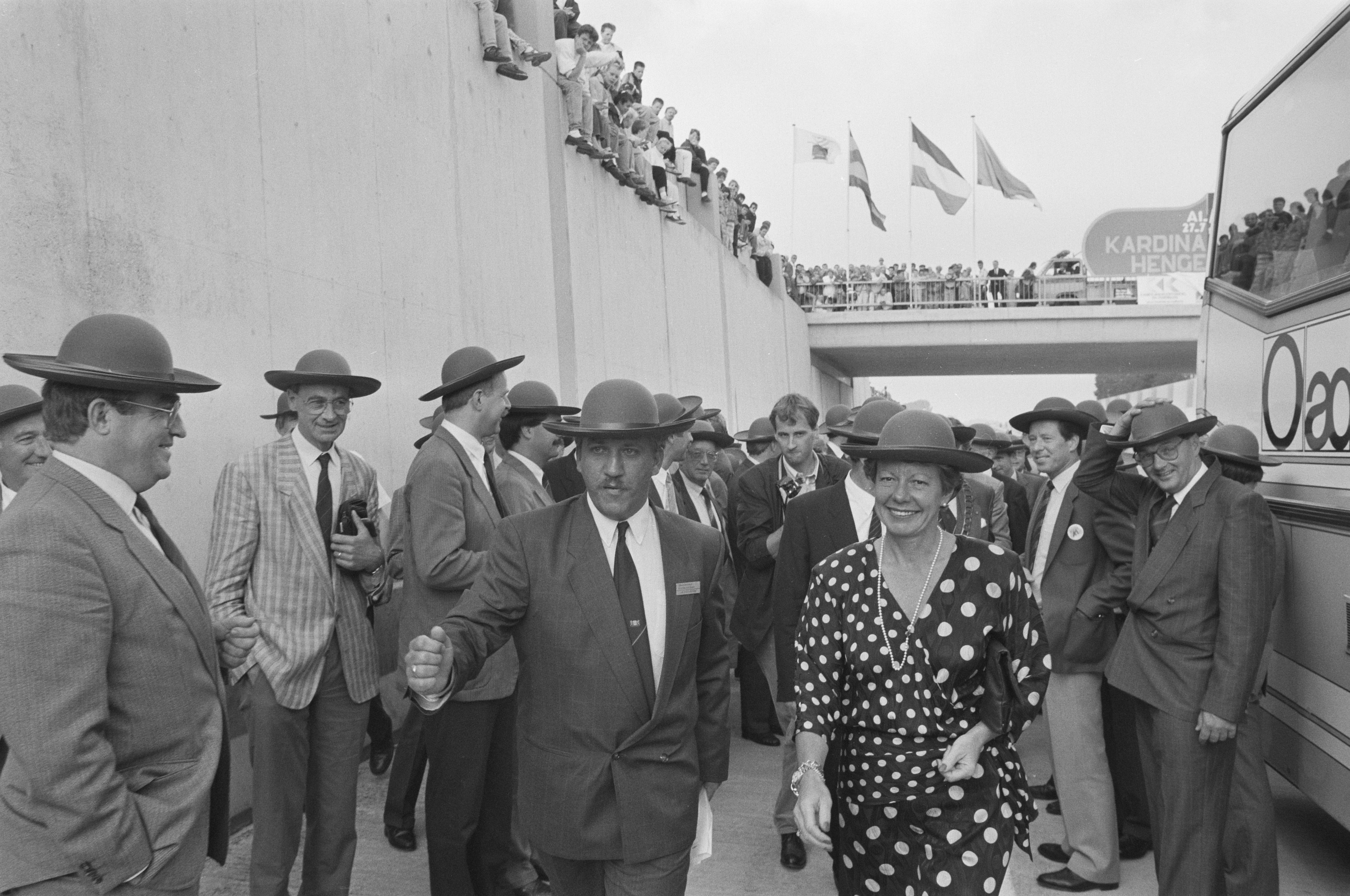 Collectie / Archief : Fotocollectie Anefo Reportage / Serie : [ onbekend ] Beschrijving : Minister Smit Kroes opent bij Hengelo "Kardinaalshoed" Smit Kroes en genodigden allen getooid met een hoed Datum : 27 juli 1988 Locatie : Hengelo, Overijssel Trefwoorden : hoeden, openingen, wegen Persoonsnaam : Smit-Kroes, Neelie Fotograaf : Bogaerts, Rob / Anefo Auteursrechthebbende : Nationaal Archief Materiaalsoort : Negatief (zwart/wit) Nummer archiefinventaris : bekijk toegang 2.24.01.05 Bestanddeelnummer : 934-2914